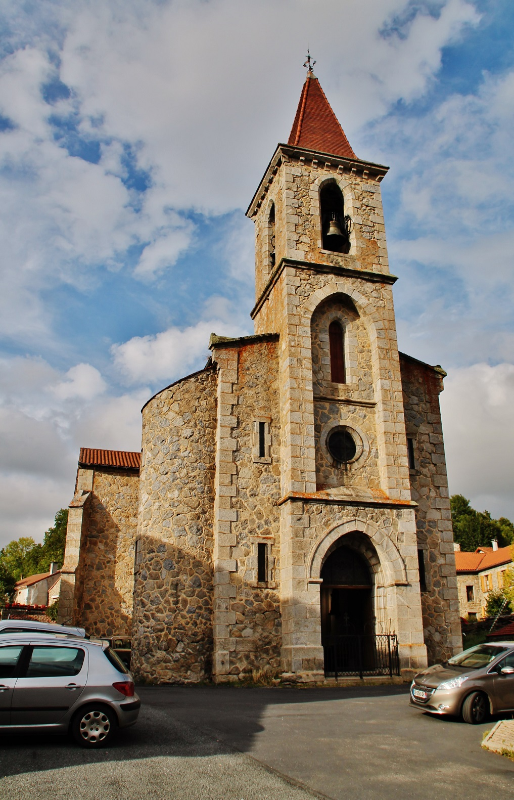 l'église